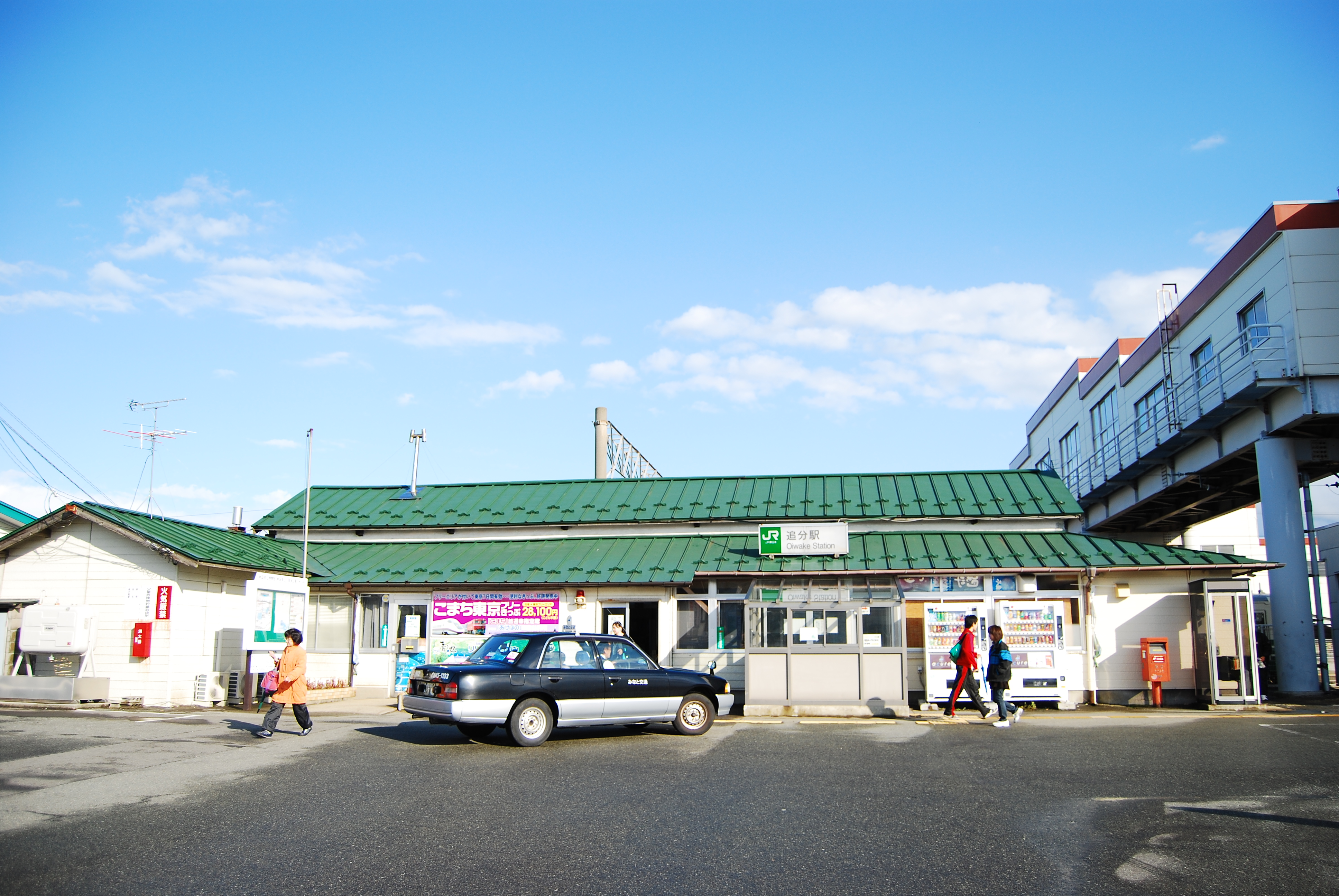 投稿者本人により2009年11月23日に撮影された、 東日本旅客鉄道 奥羽線 追分駅の写真です。